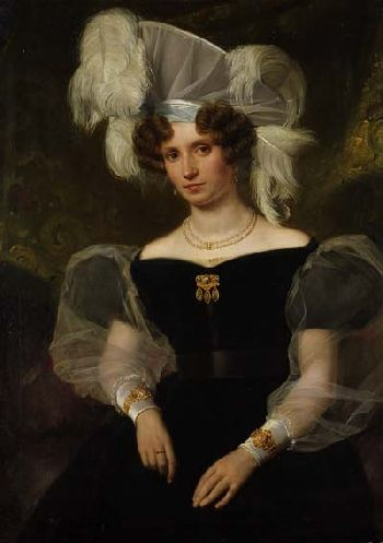 Porträt der Therese von Schenk (Ehefrau des bayerischen Kultusministers Eduard von Schenk)